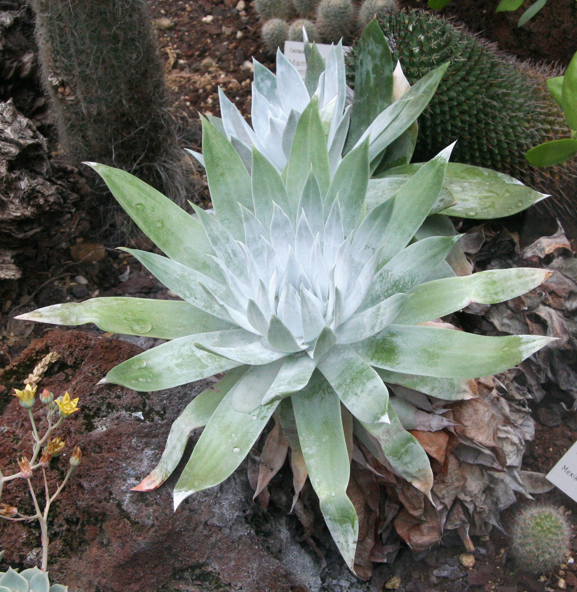 Dudleya anthonyi im Botanischen Garten Köln